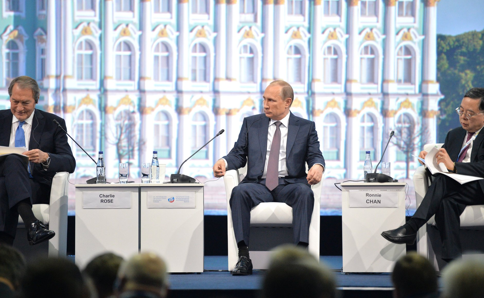 Президент России Владимир Путин на пленарном заседании XIX Петербургского международного экономического форума